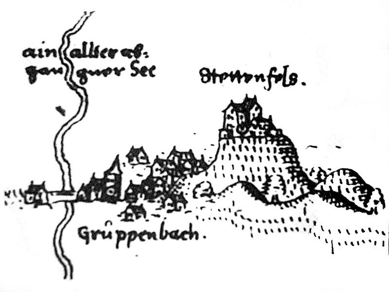 Burg Stettenfels mit Untergruppenbach, Ansicht von 1598